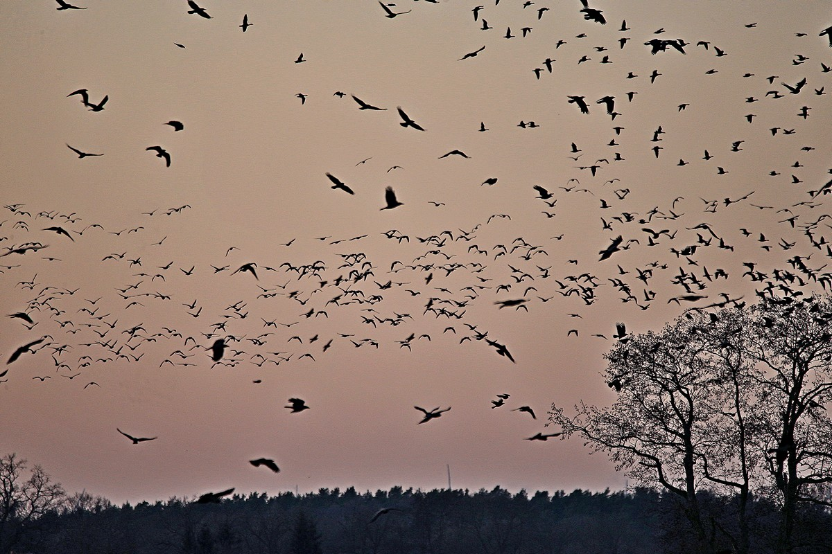 Rabenkrähenschwarm in Südmecklenburg